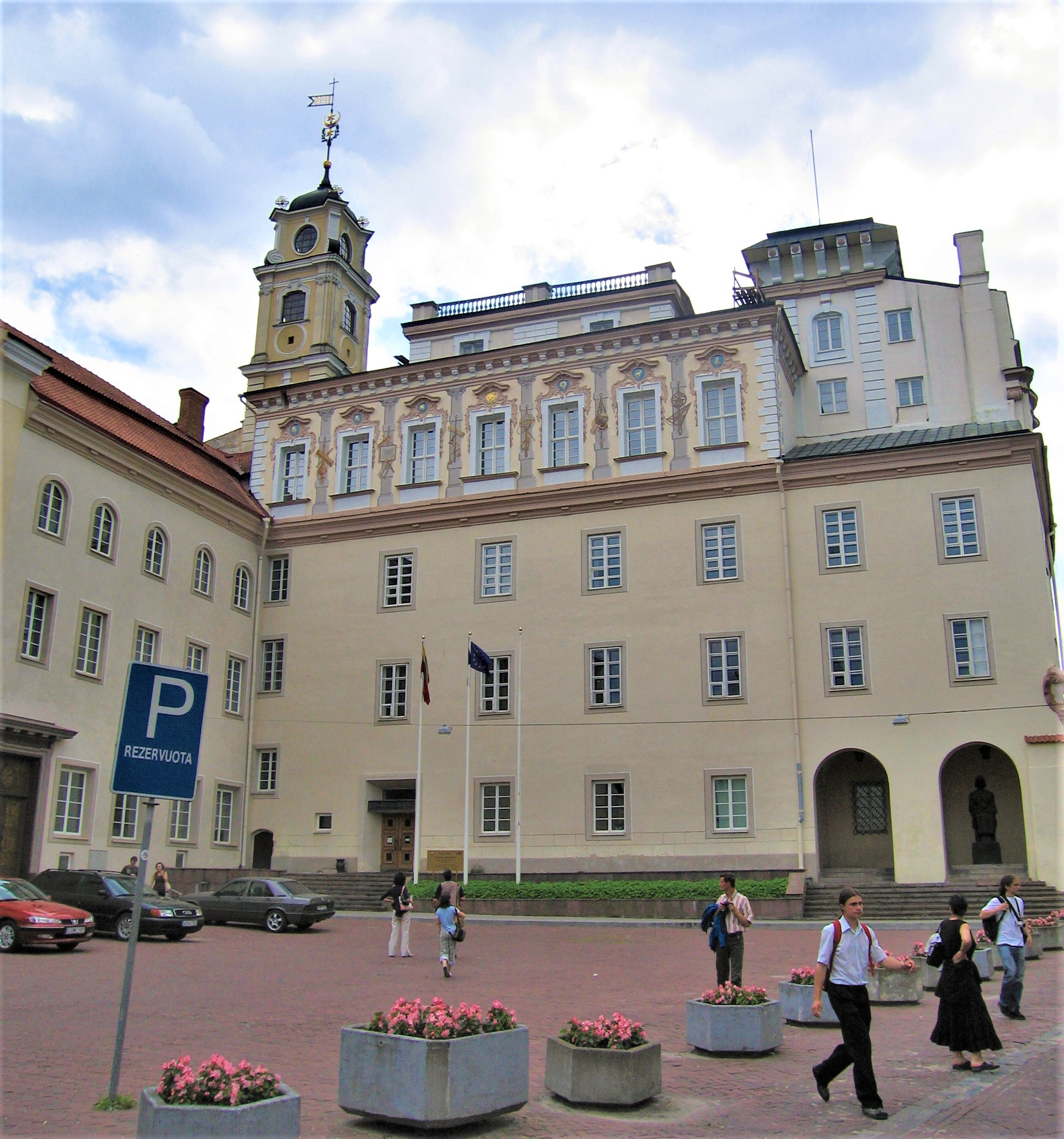 Vilnius University 2007 July 15